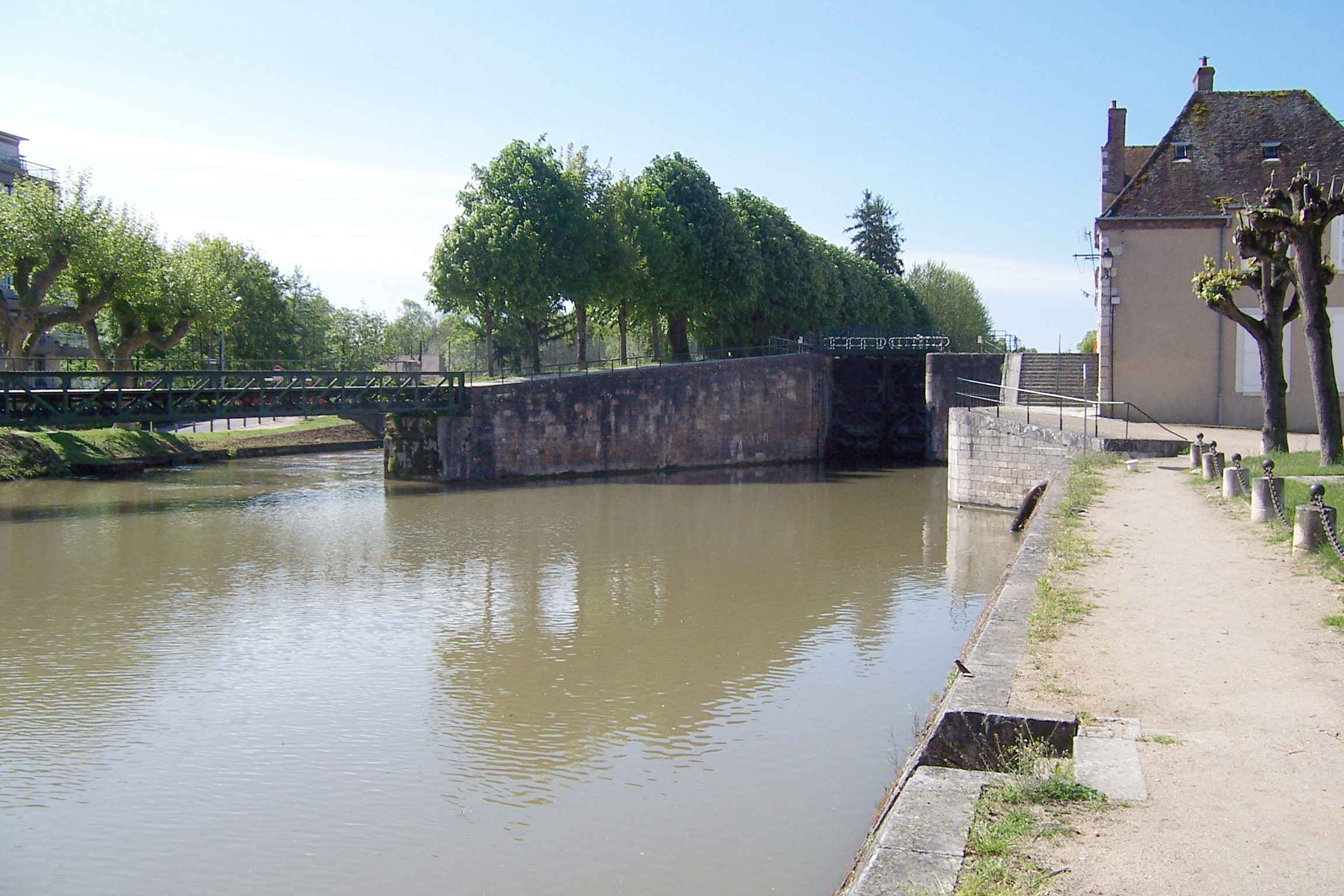 France - Loiret - Montargis - L'écluse au bout du Bd Durzy